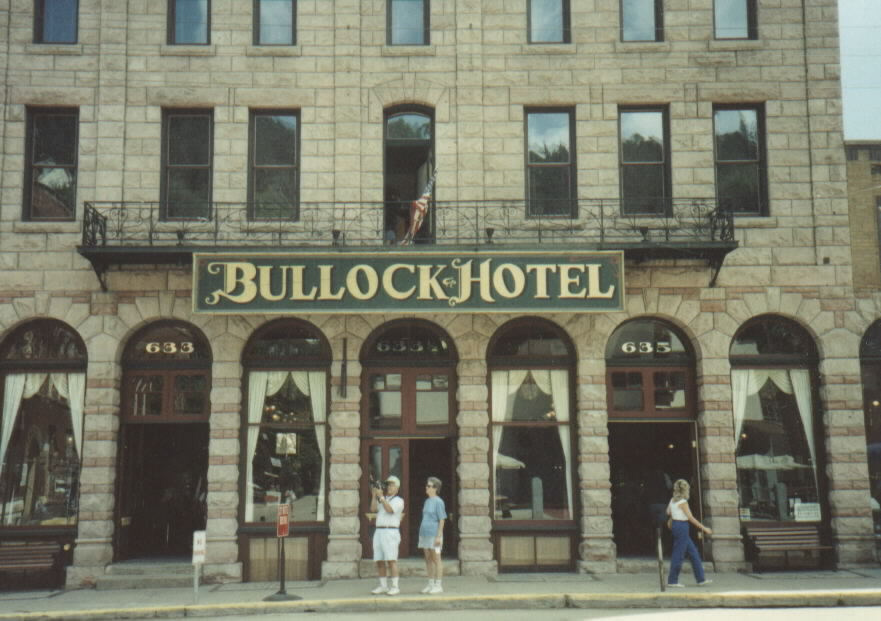 Deadwood, SD.